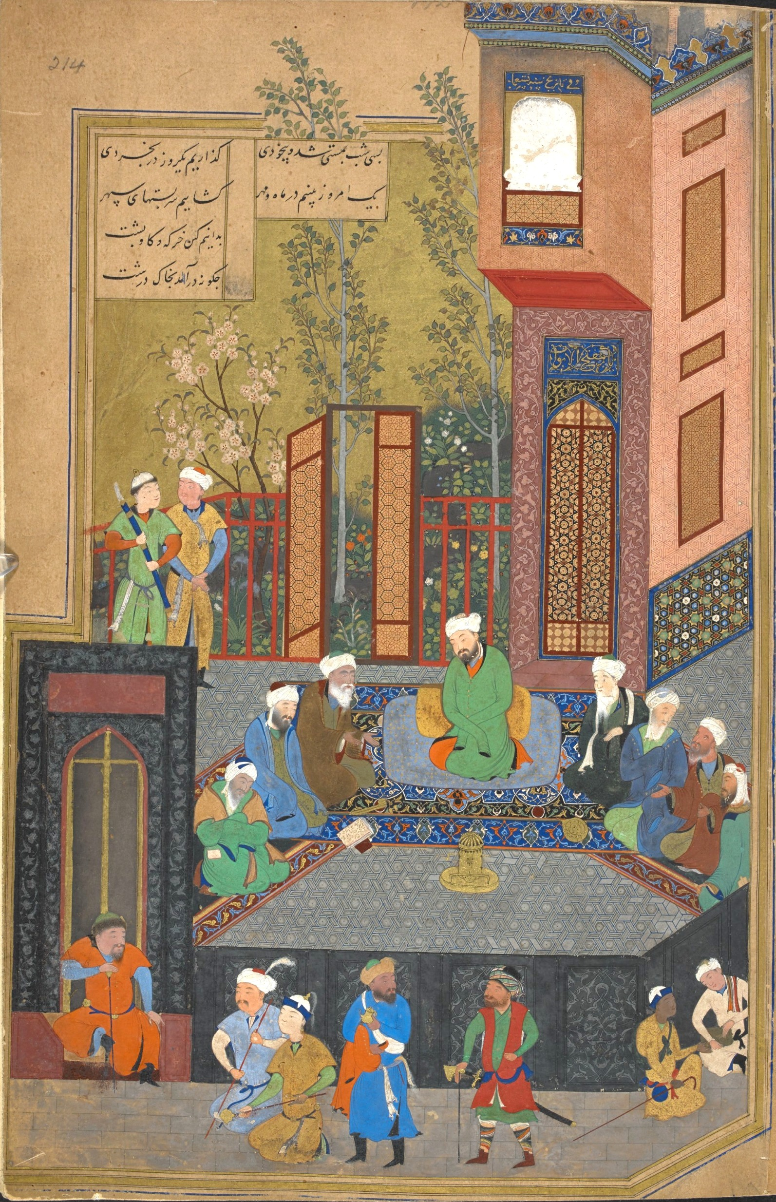 Behzad._Искандер_и_семь_мудрецов.Хамсе_Низами._